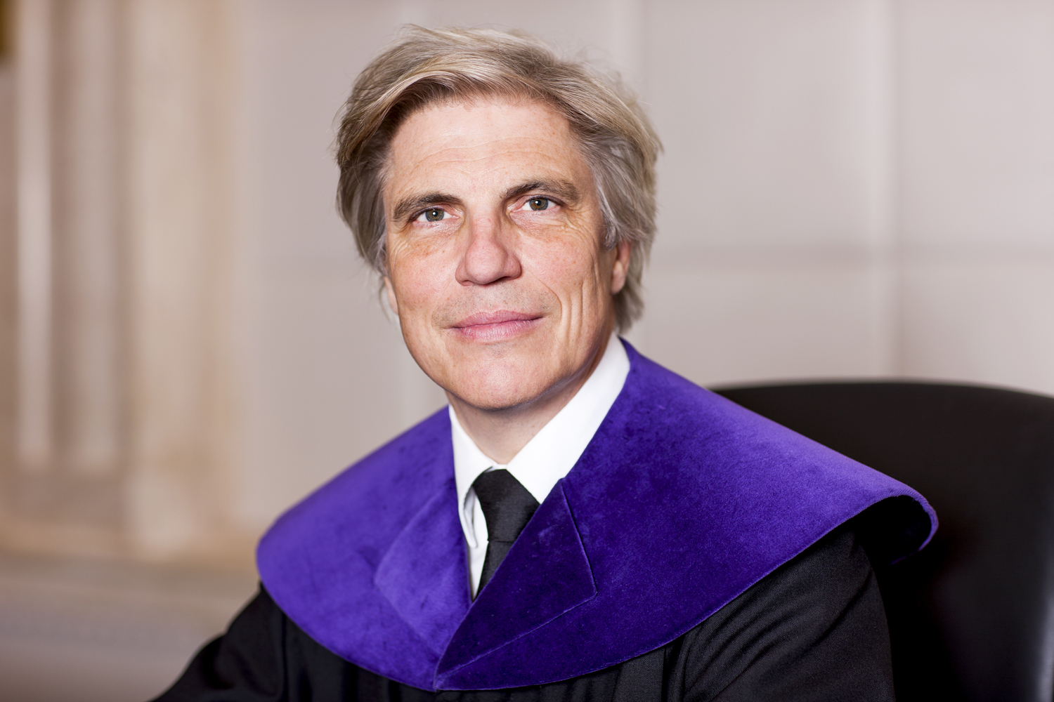 Dr. Johannes Schnizer, Mitglied des österreichischen Verfassungsgerichtshofs seit 2010.